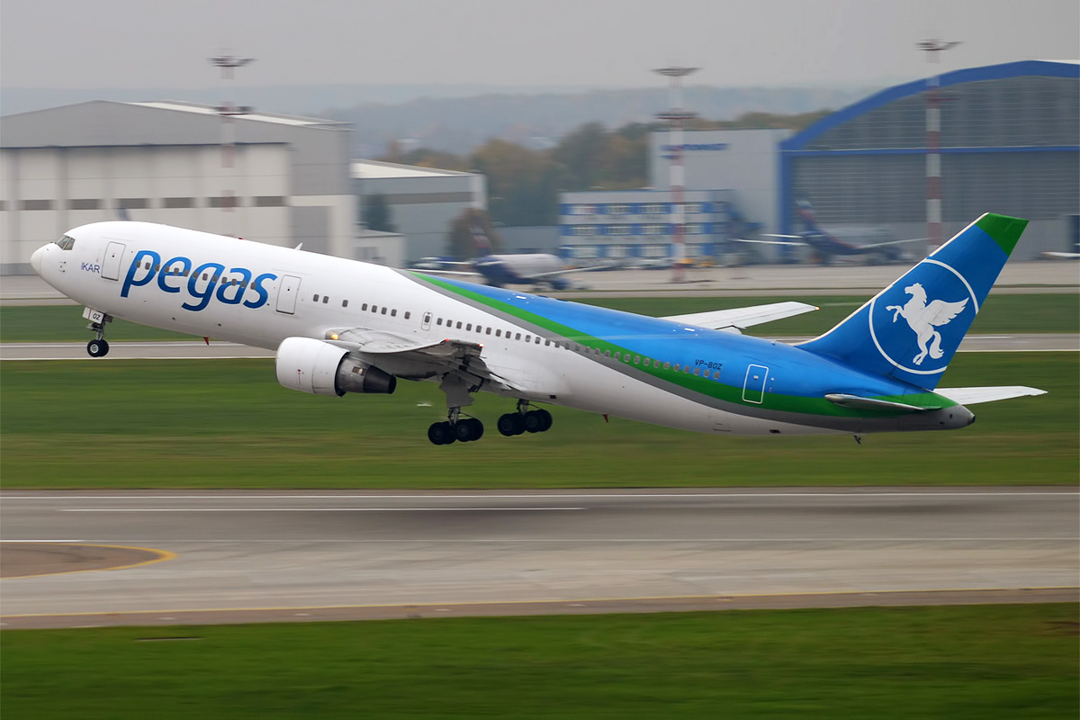 Ikar, VP-BOZ, Boeing 767-3G5 ER